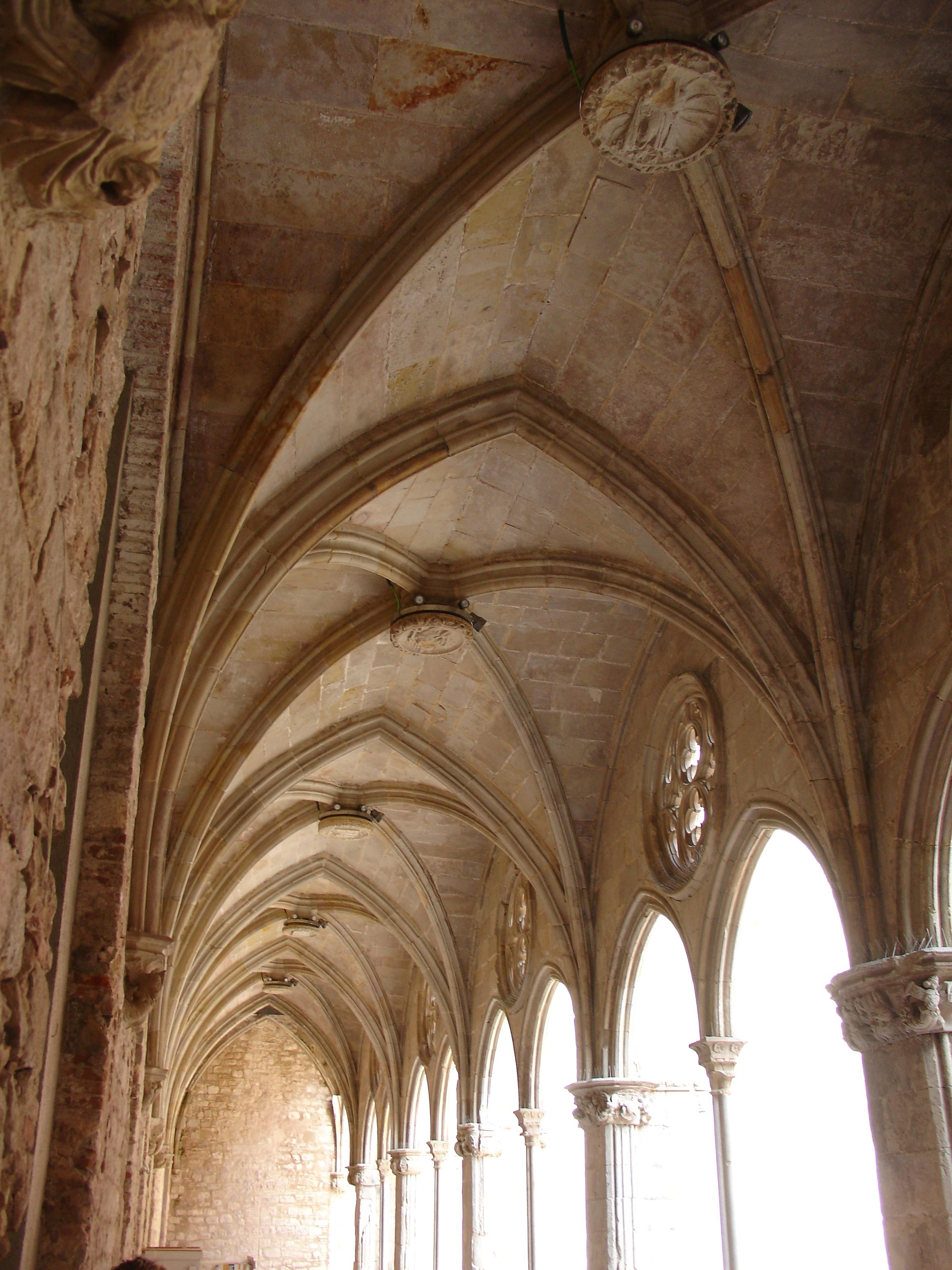 Claus de volta - Sant Agusti.jpg.